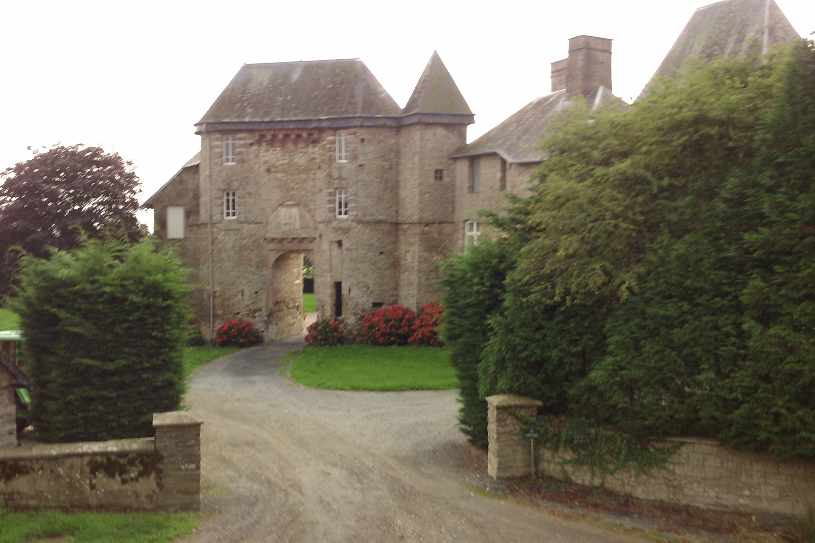 le chateau du Mesnil-Amey]